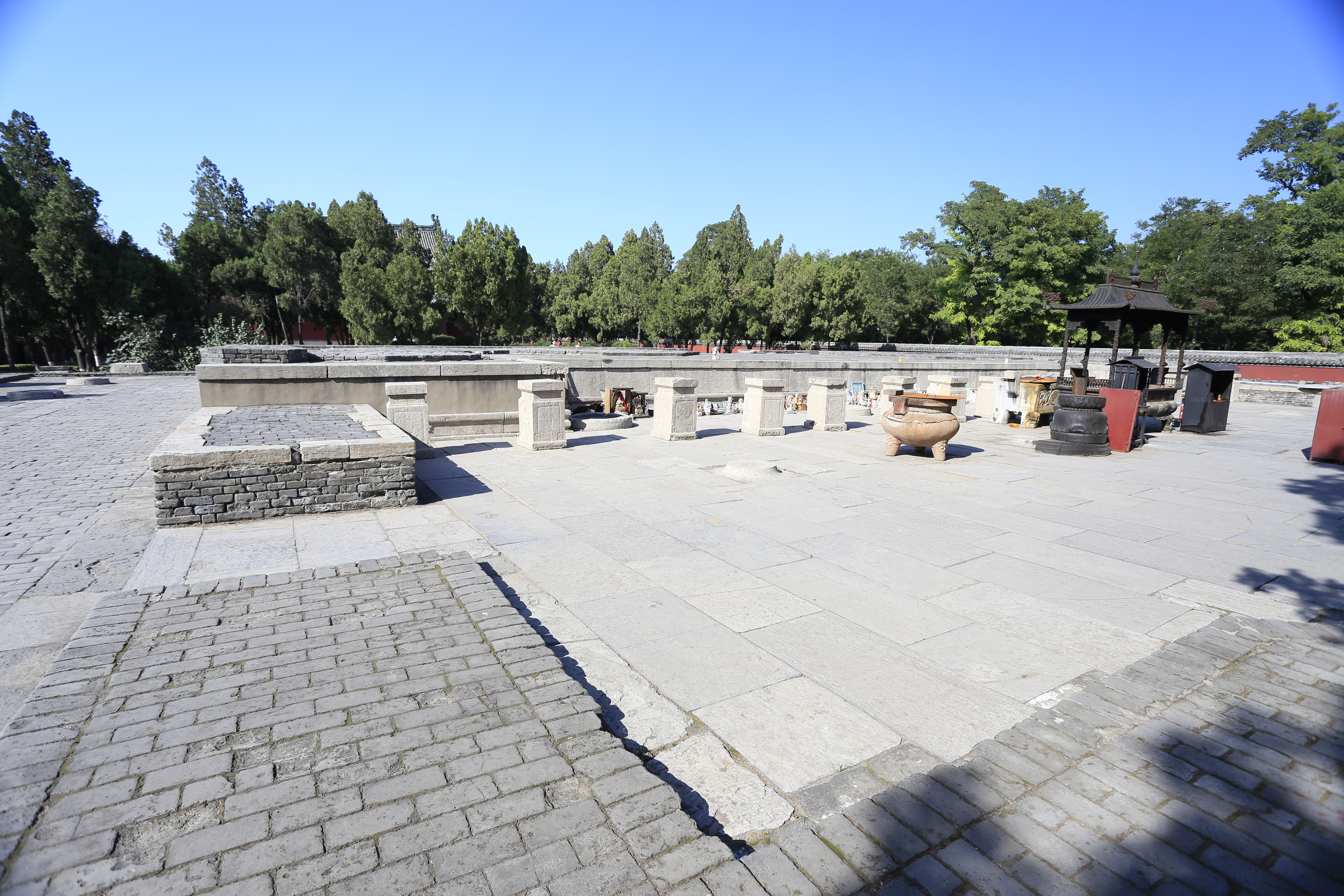 正定隆兴寺 大觉六师殿遗址